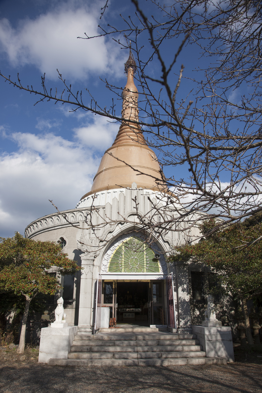 北九州市門司区布刈にある日本唯一の正統なミャンマー式パゴダ